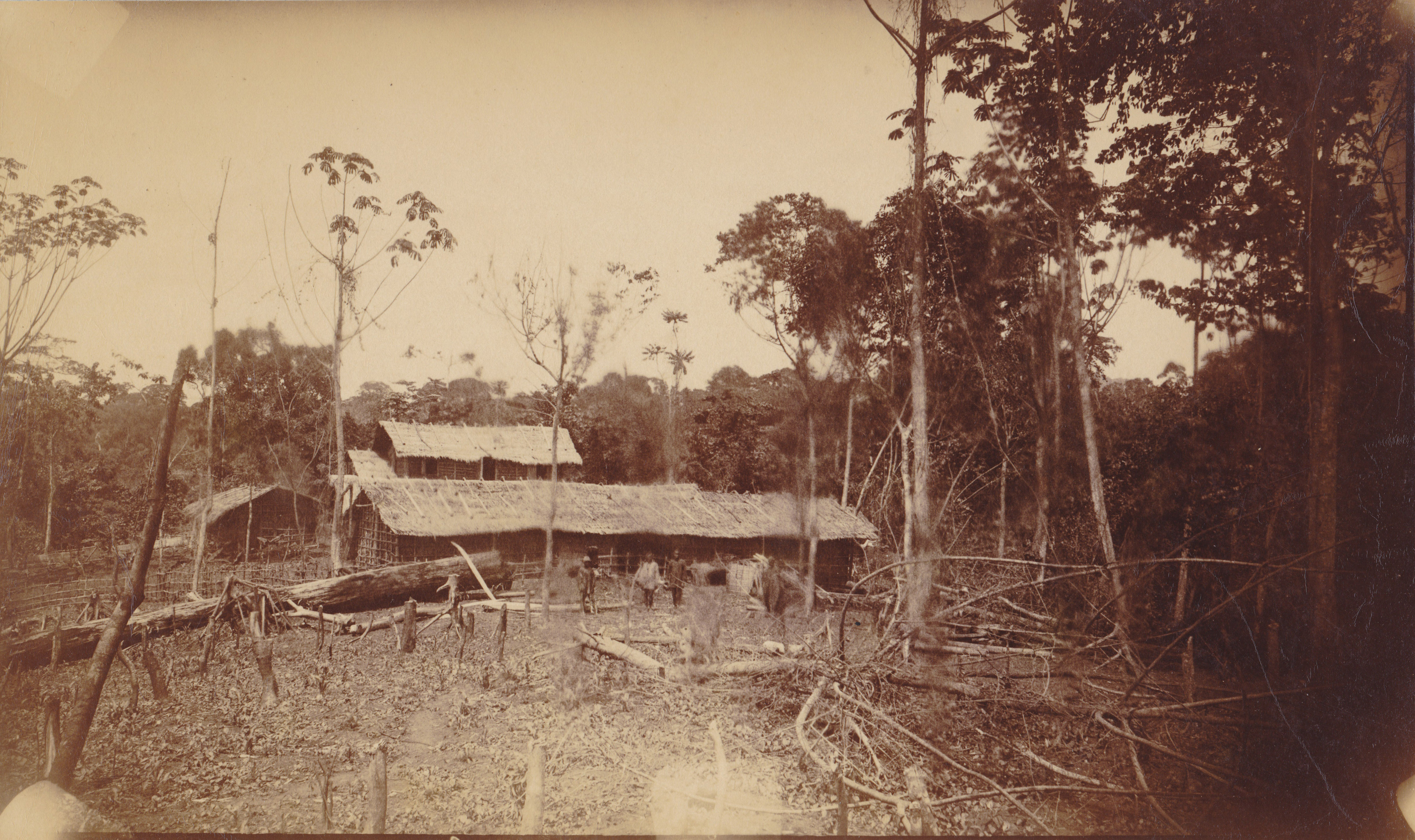 Barombi-Station von hinten